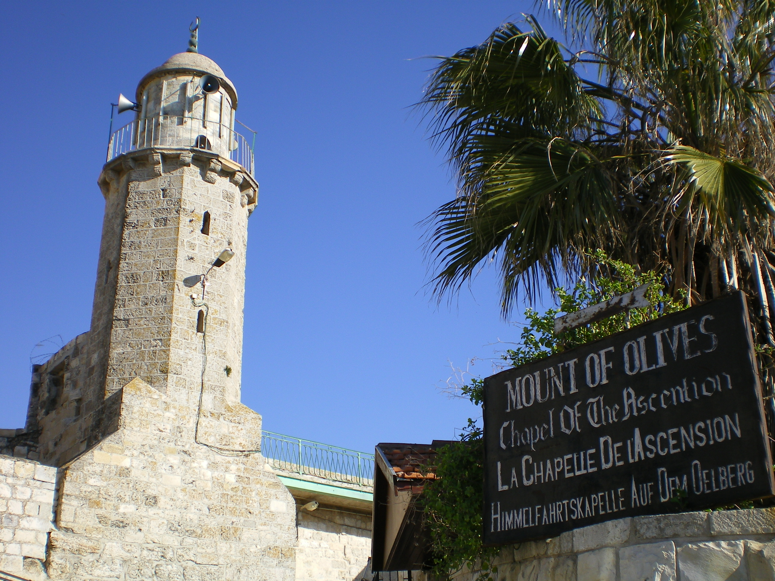 Chapelle de l'ascension